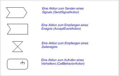 Aktion (UML2) - Beispiel 2